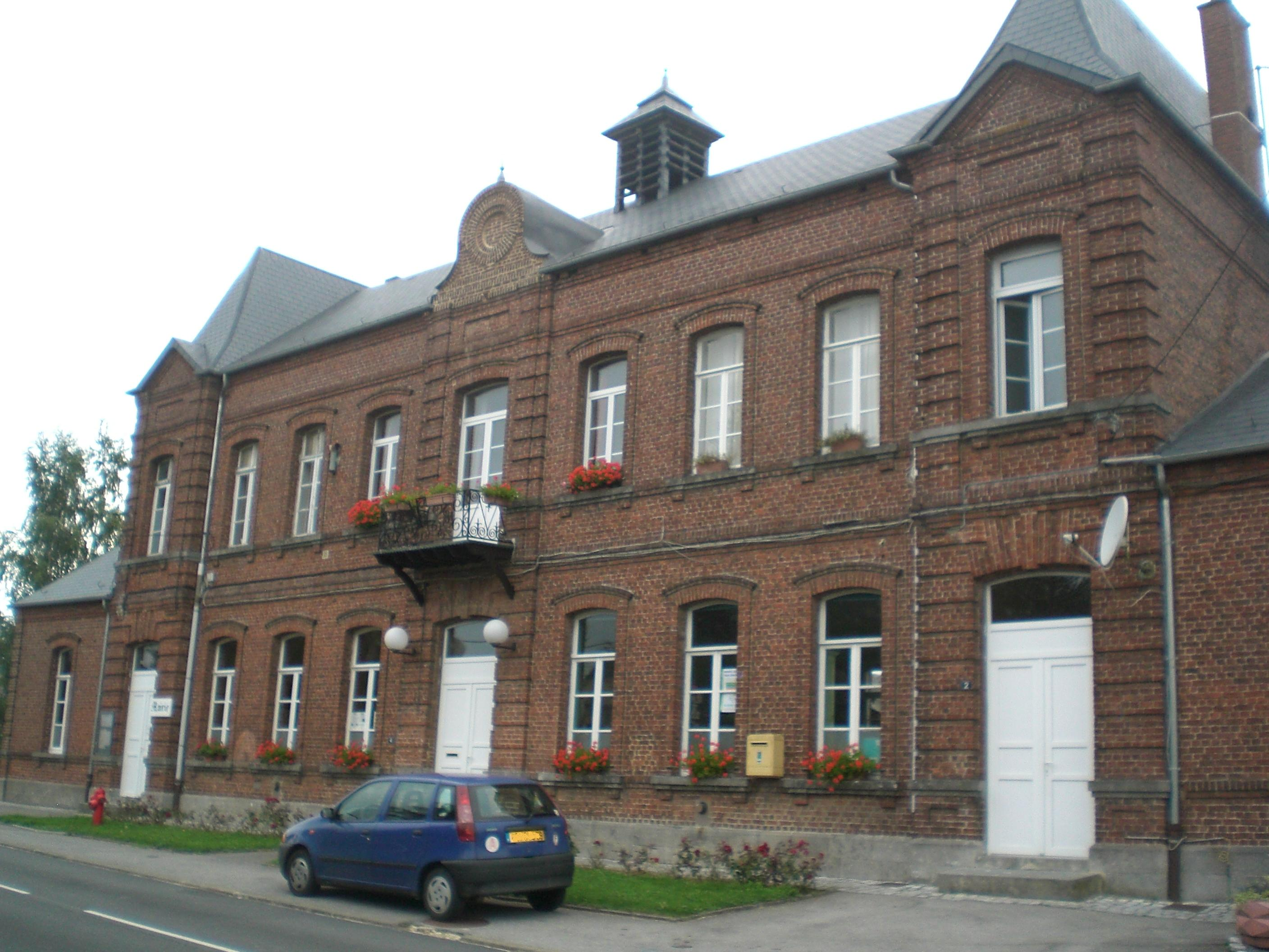 mairie de Haut-Lieu 4 route de boulogne 59440 haut-lieu